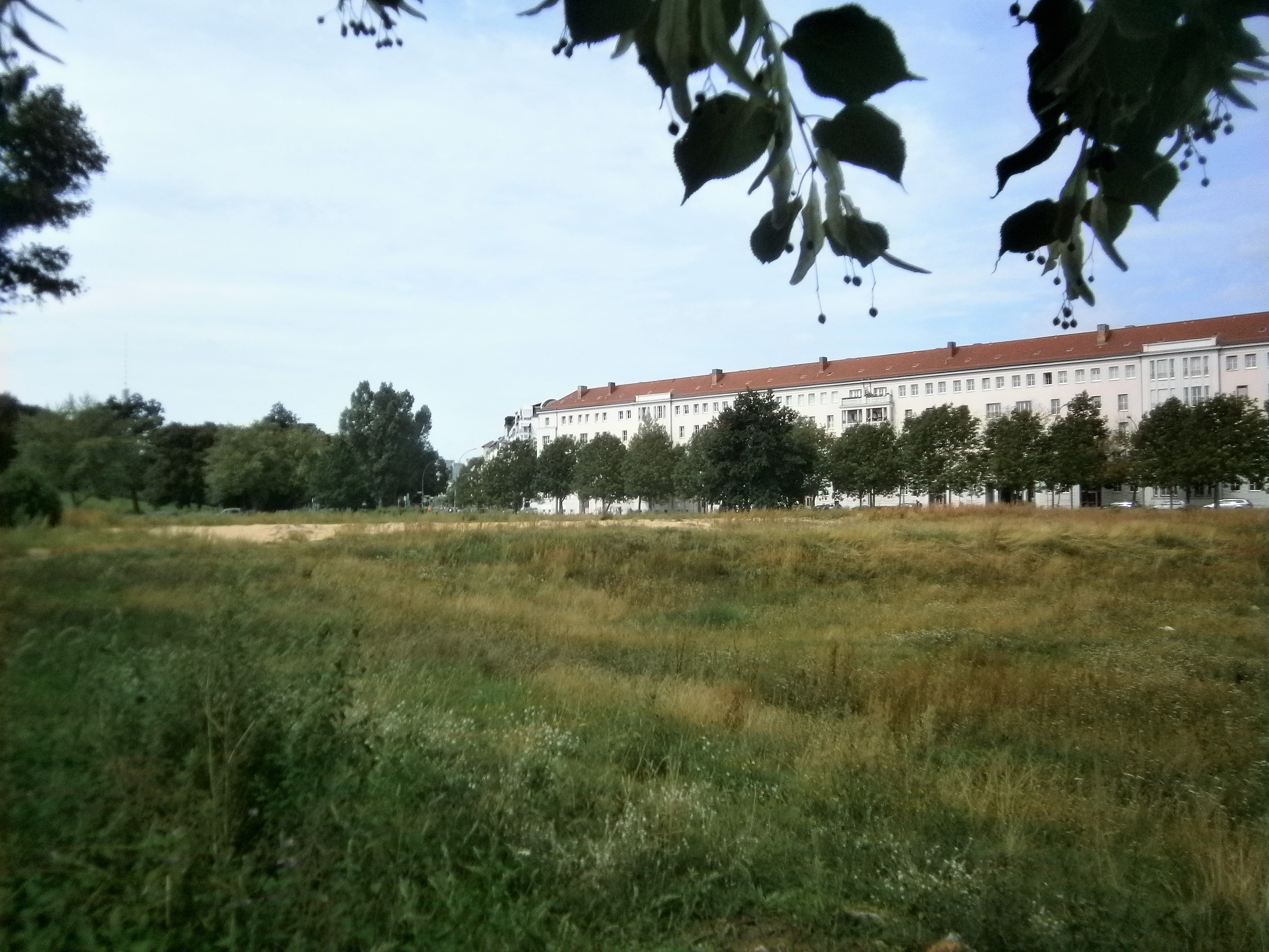 Die Kniprodestraße liegt am östlichen Bereich des Berliner Bezirks Pankow und begrenzt die Grüne Stadt und teilt im Bötzowviertel den Ostbereich der Werneuchener Wiese. Blick über die Werneuchener Wiese nach West zur Bebauung Kniprodestraße Ecke Hufelandstraße. Blick in die Straße Am Friedrichshain.